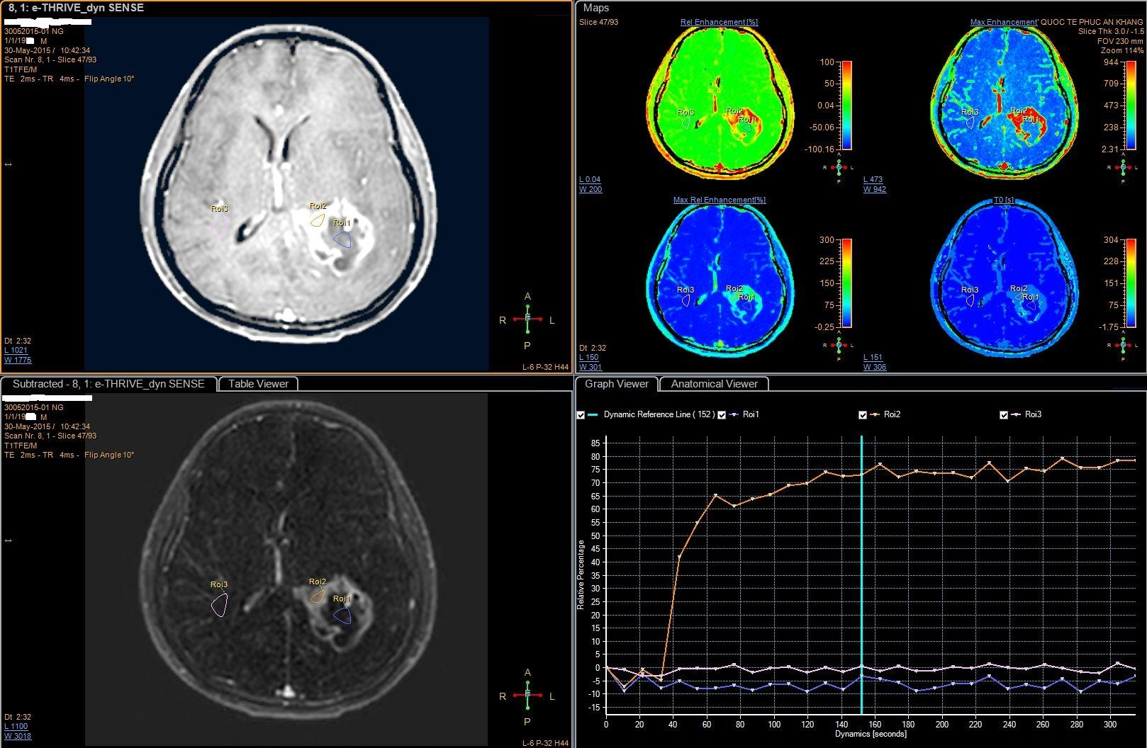 MRI tưới máu T1W với Gadovist